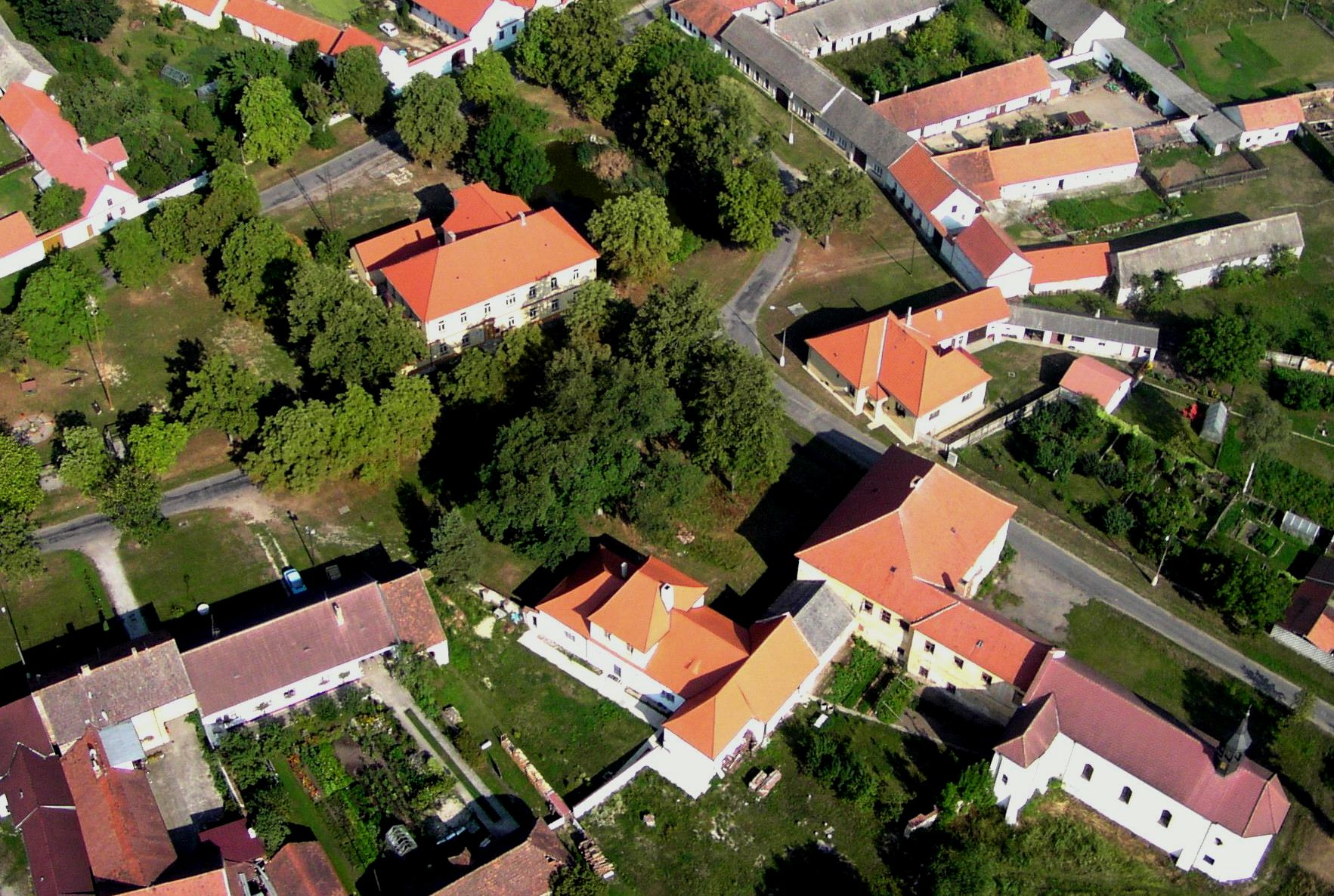 Zámek Zálší, Zálší